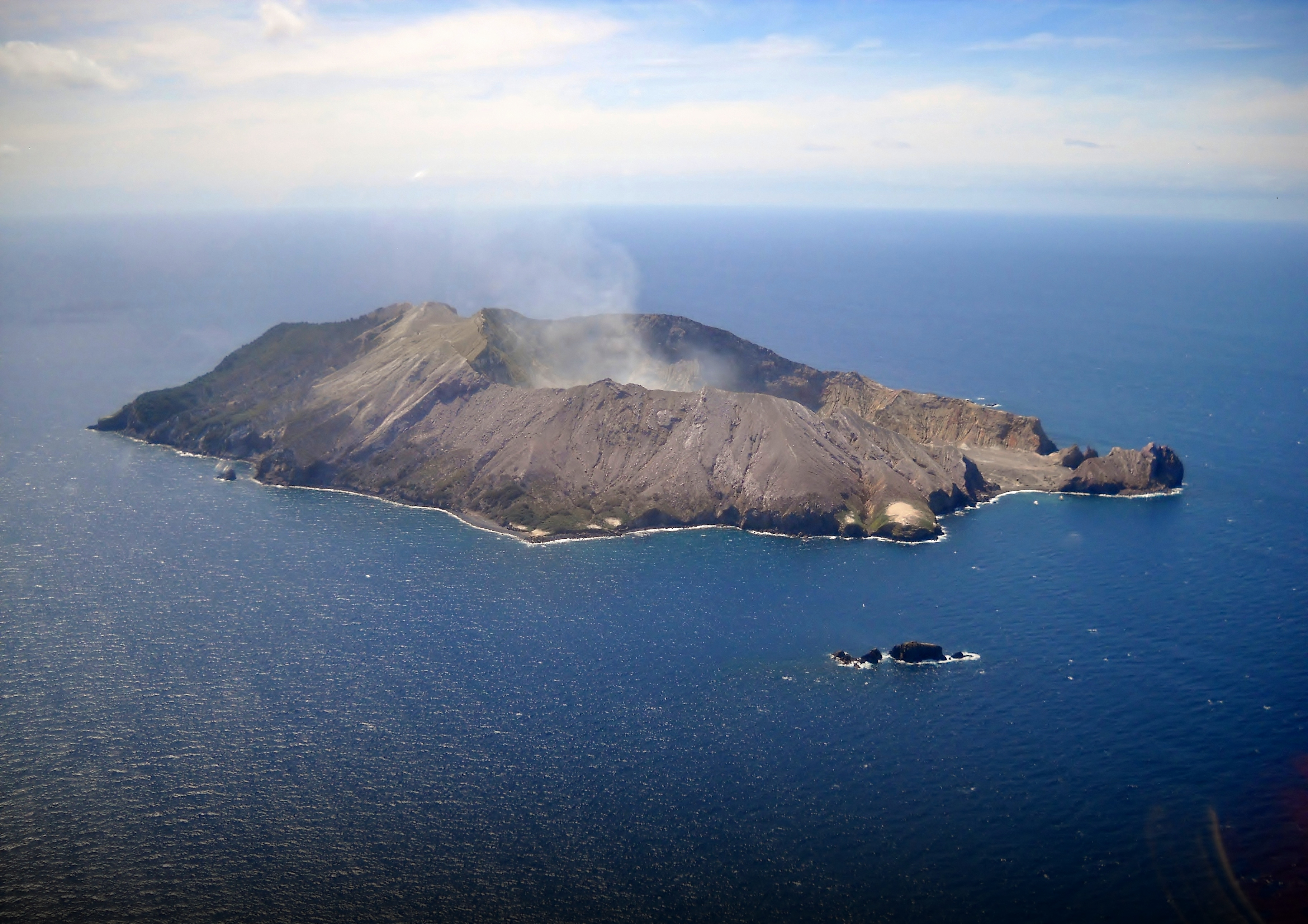 White Island, en maori Whakaari, est une petite île inhabitée et volcanique de Nouvelle-Zélande White Island New Zealand